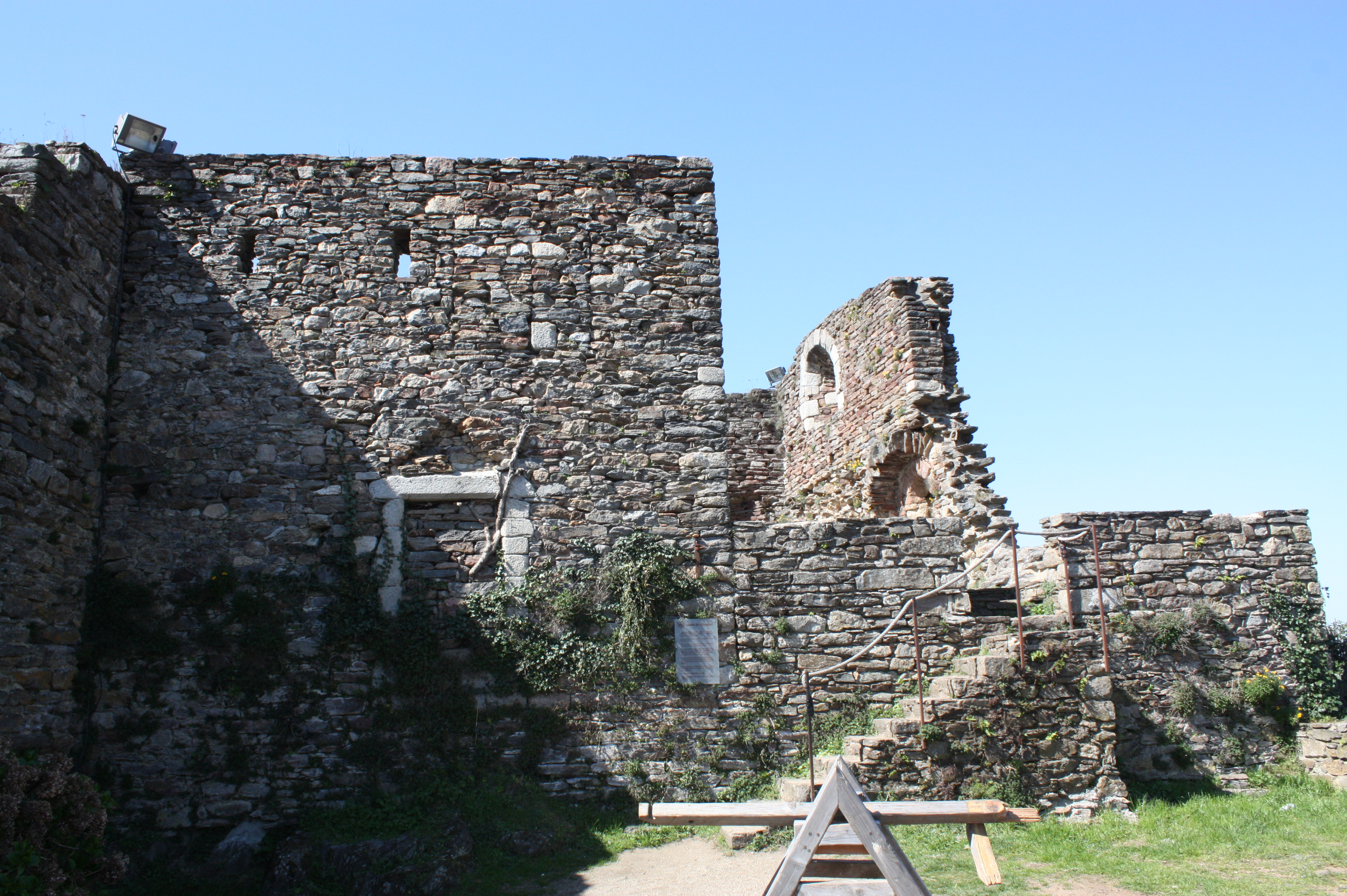 Ruines du château d'Hautpoul.